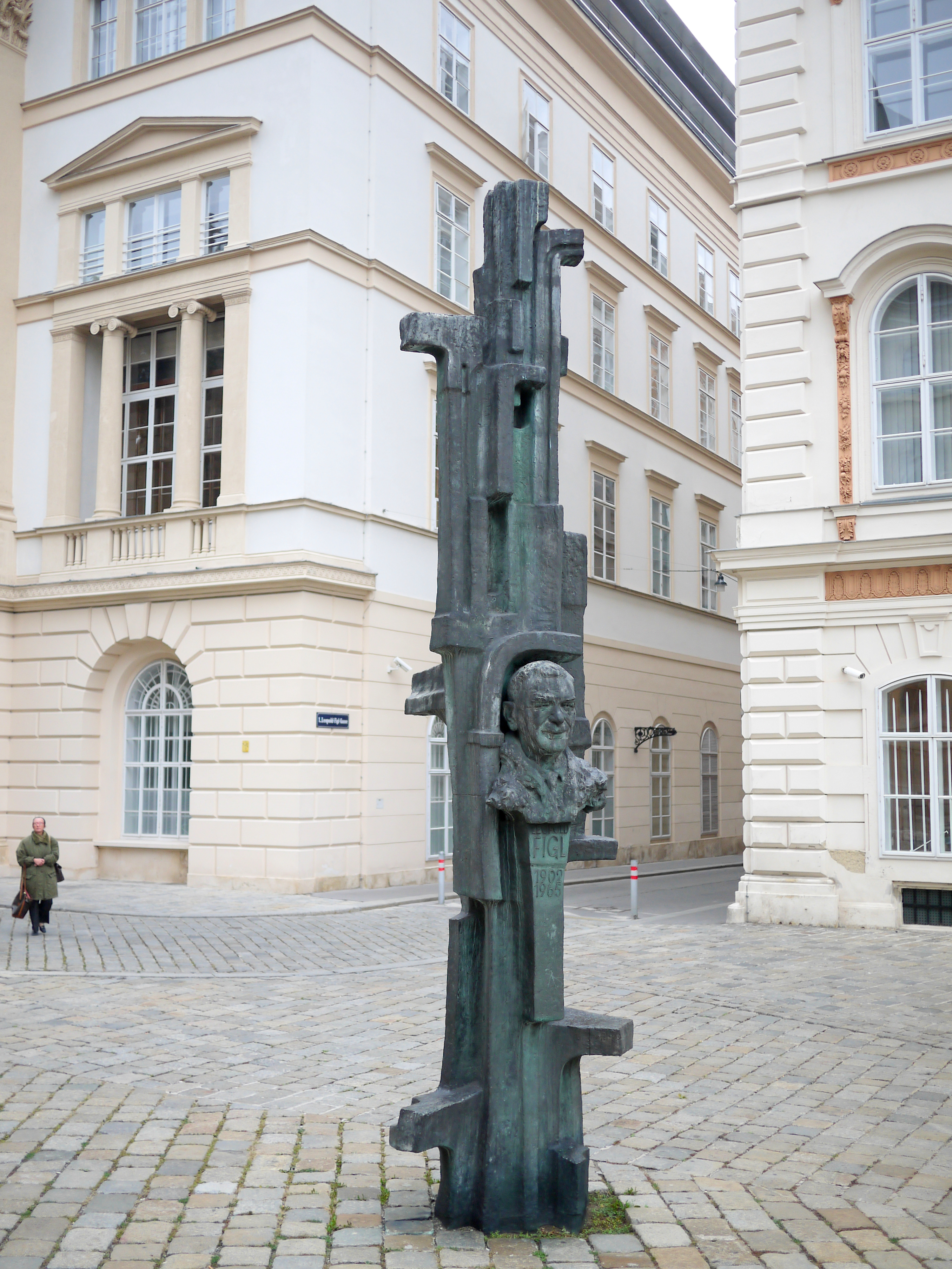 Leopold Figl - Denkmal